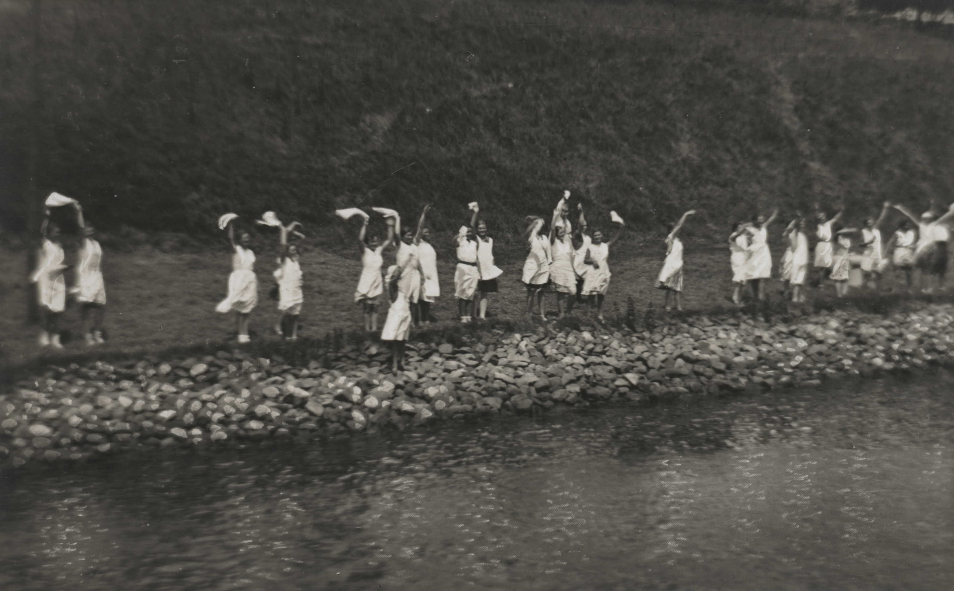 Schülerinnen der Kolonialen Frauenschule Rendsburg am Kaiser-Wilhelm-Kanal in Rendsburg